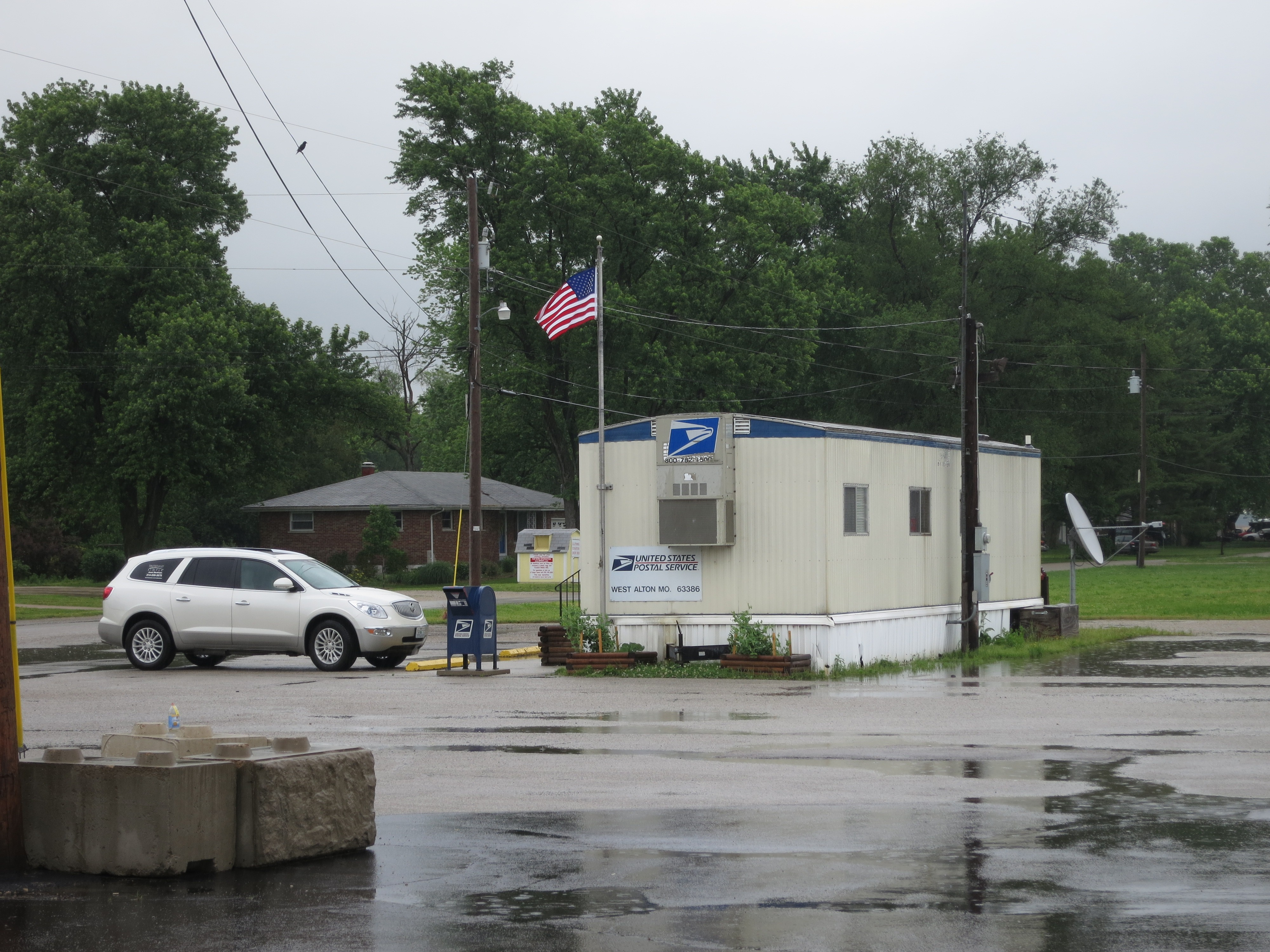 West Alton, Mo